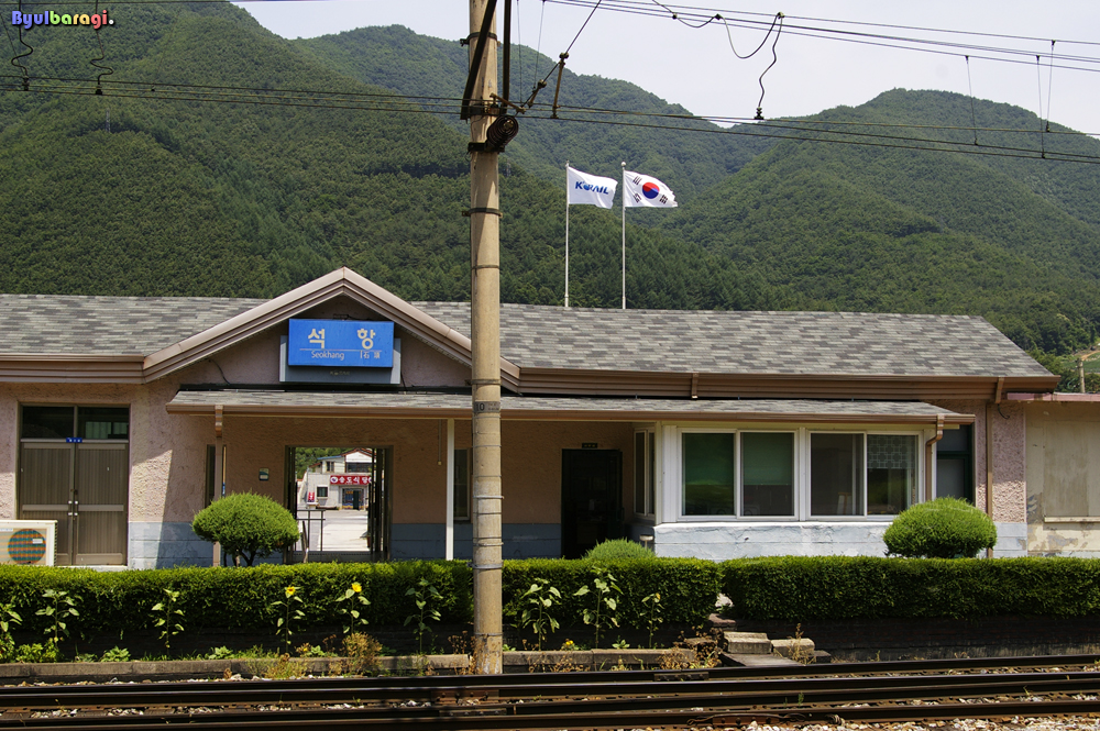 태백선 석항역 역사(선로측)